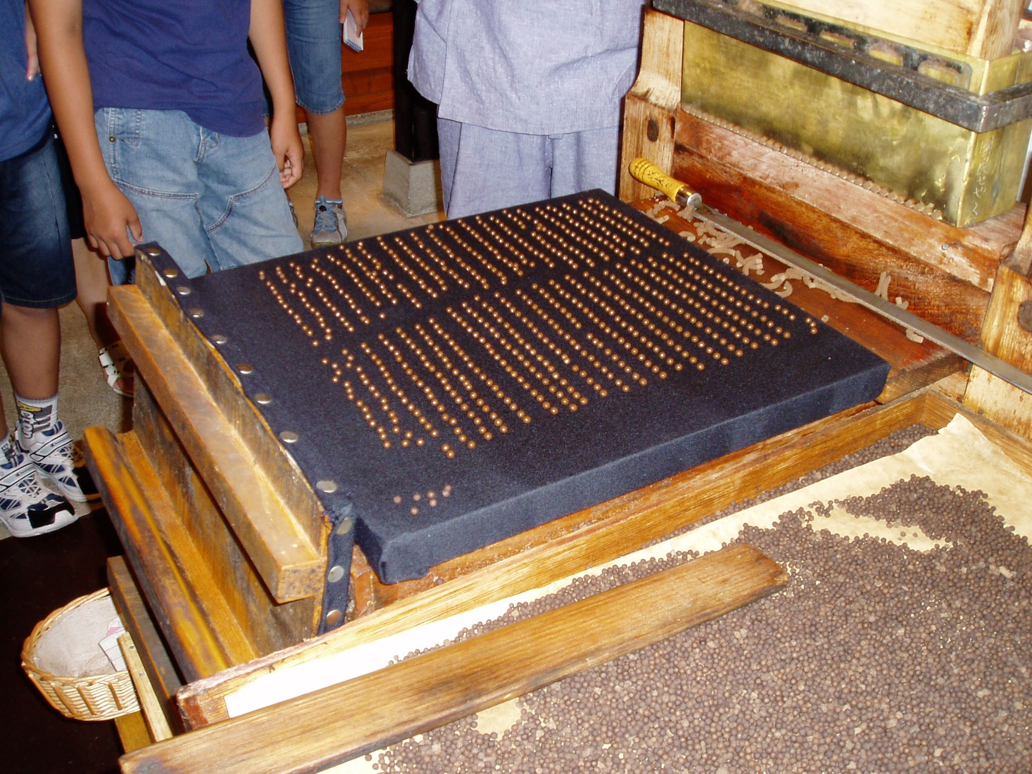 できたての医薬品